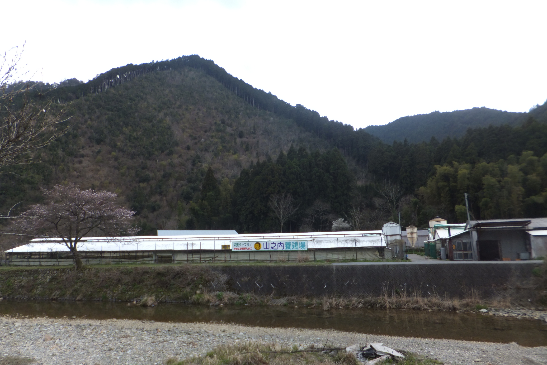 山之内養鶏場